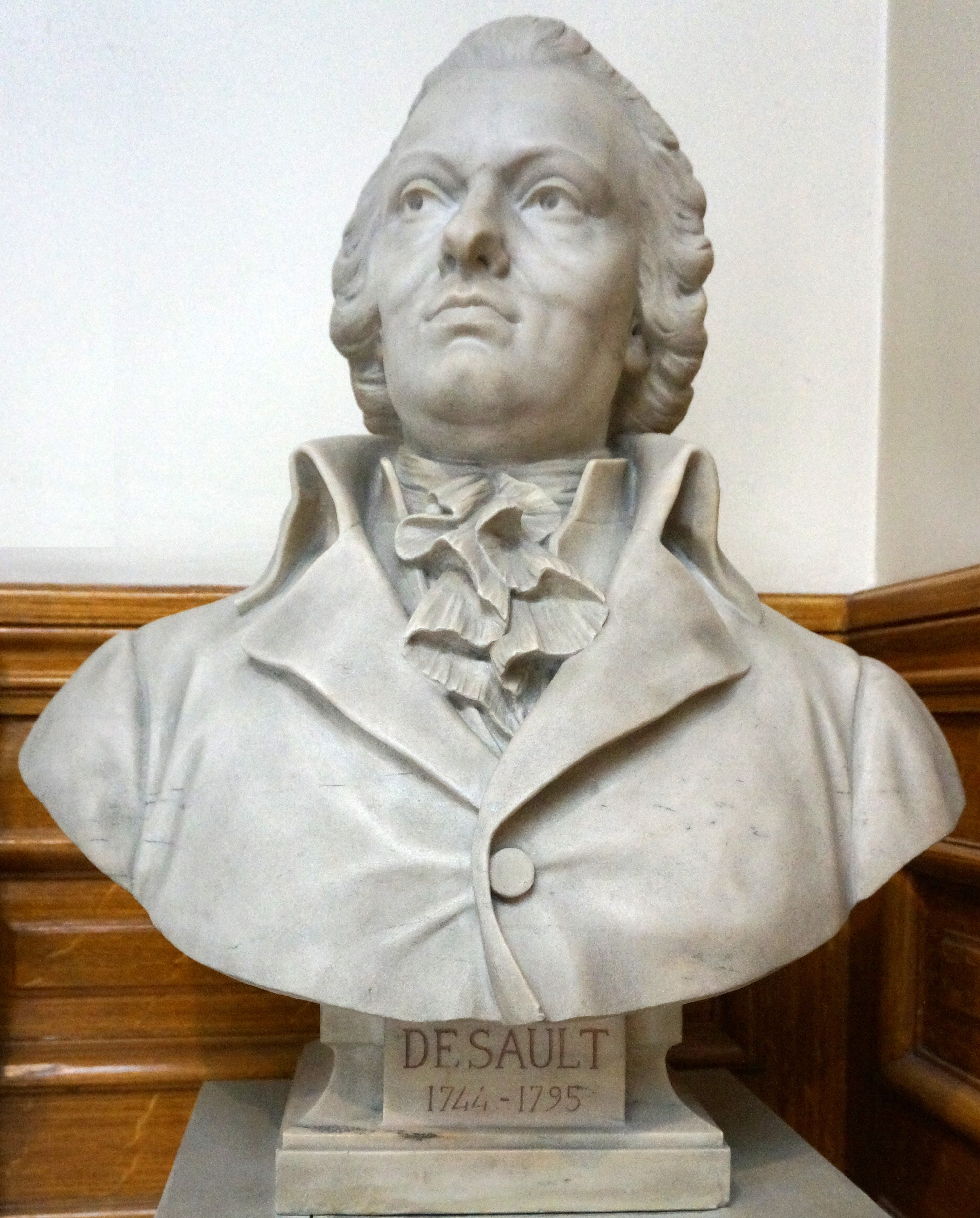 dans les couloirs qui menent au Musée d'histoire de la médecine.